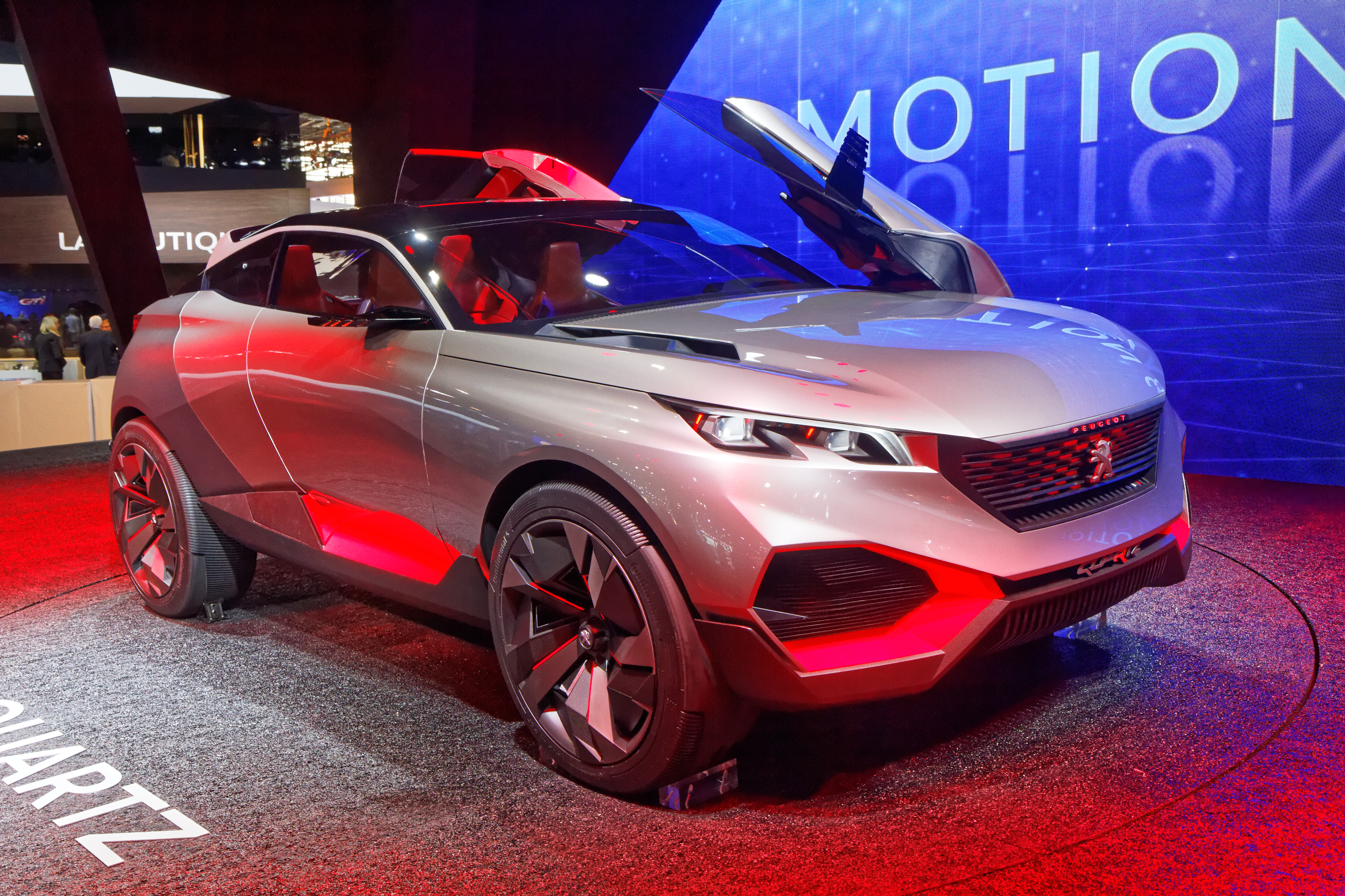 Une Peugeot Quartz présentée lors du mondial de l'automobile de Paris 2014.